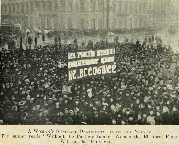 Женская демонстрация на Невском проспекте (Петроград, 1917).